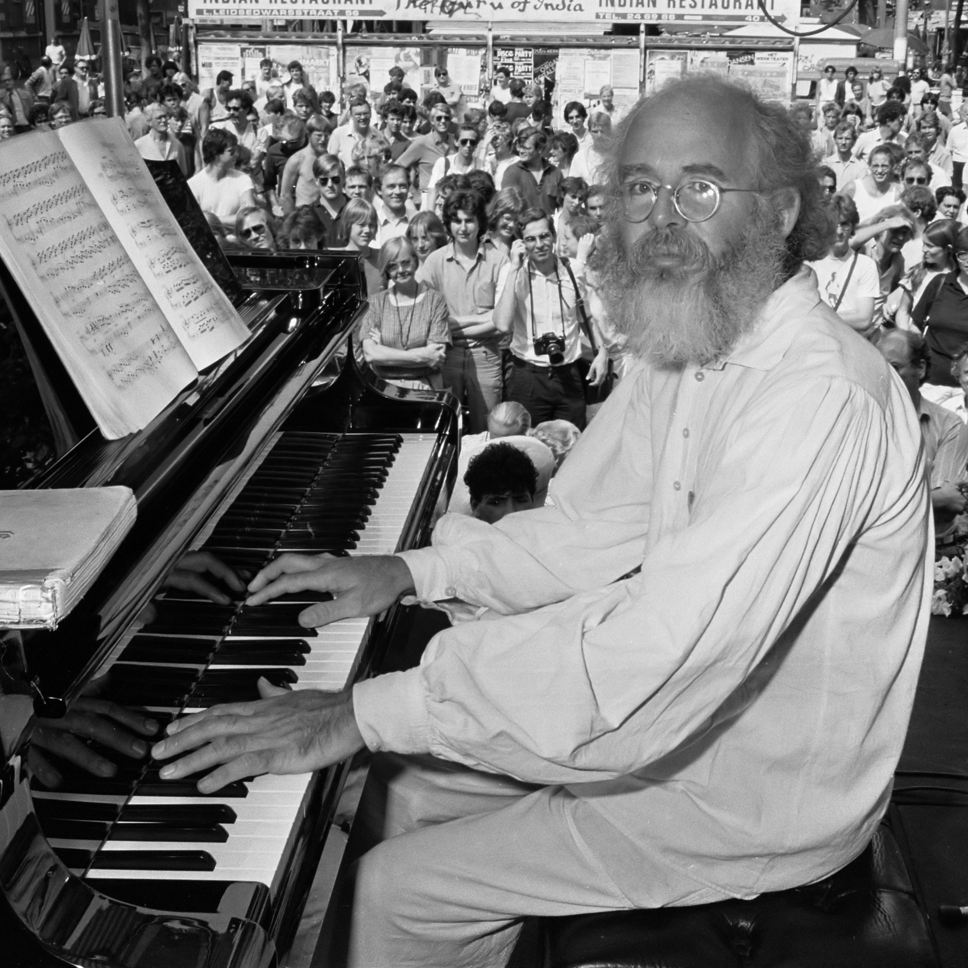 Gary Goldschneider geeft Beethovenmarathon in Amsterdam; Gary Goldschneider bezig met alle 32 pianosonates 19 augustus 1984